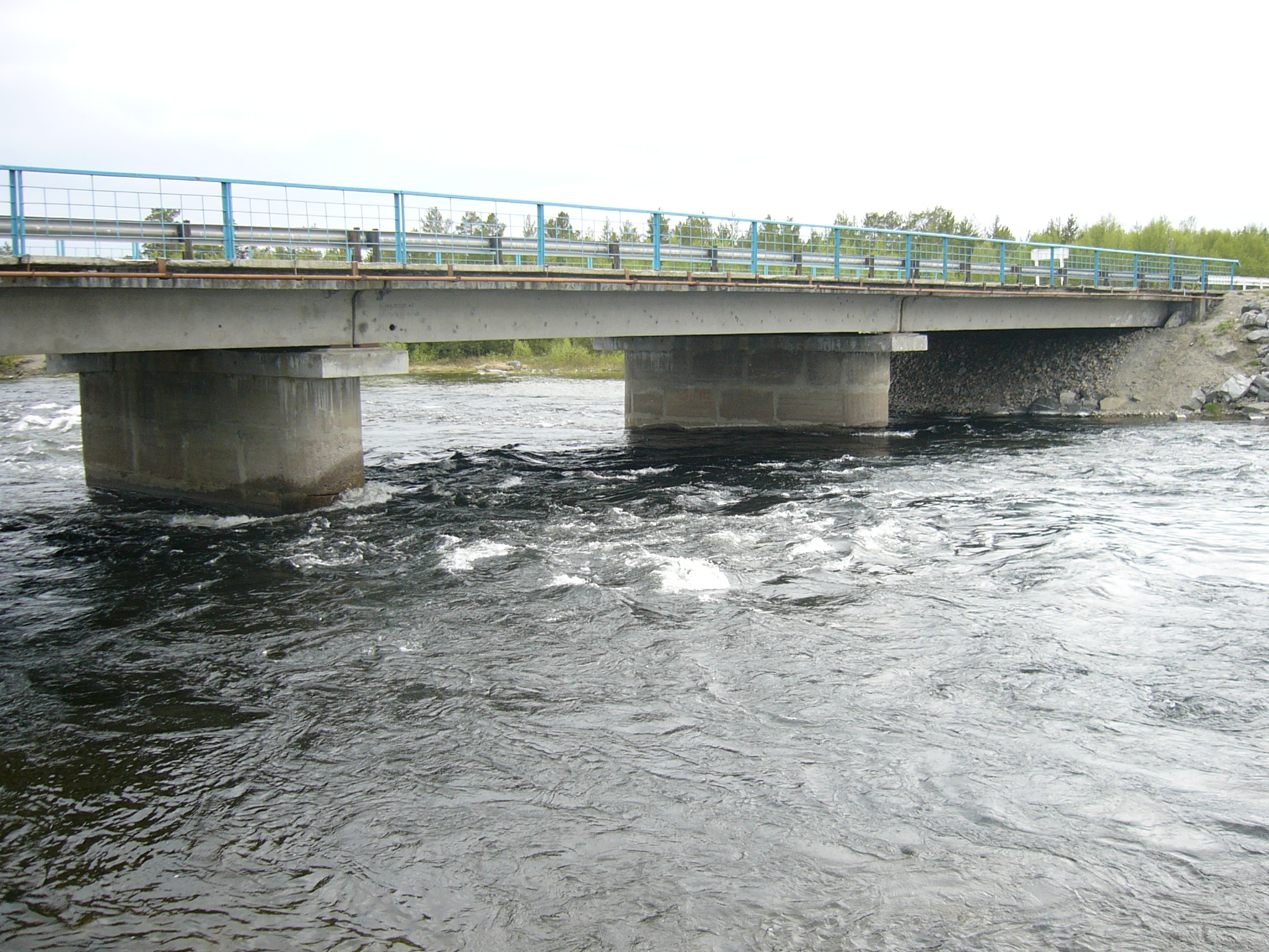 Мост через реку Пиренга (бассейн Имандры)